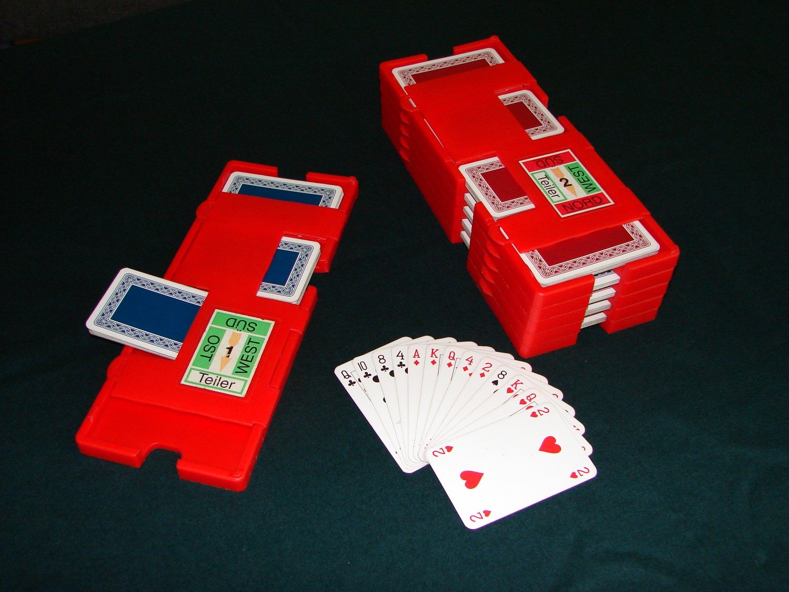 Bridge-Boards Links Board Nr. 1: Nord ist Teiler, niemand in Gefahr (grüne Markierung) Rechts Board Nr. 2: Ost ist Teiler, Nord-Süd in Gefahr (rote Markierung), Ost-West nicht in Gefahr (grüne Markierung) Bridge-Baords (german text) left board nr. 1: north is dealer, none vulnerable (green marking) right board nr. 2: east is dealer, north-south vulnerable (red marking), east-west not vulnerable (green marking)